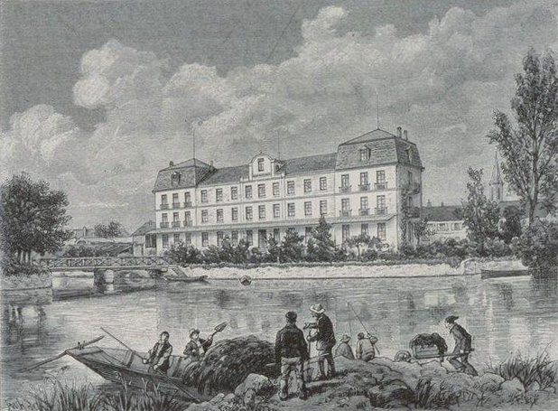 L'Etablissement d'hydrothérapie du docteur Sieffermann à Benfeld. Bibliothèque nationale et universitaire de Strasbourg